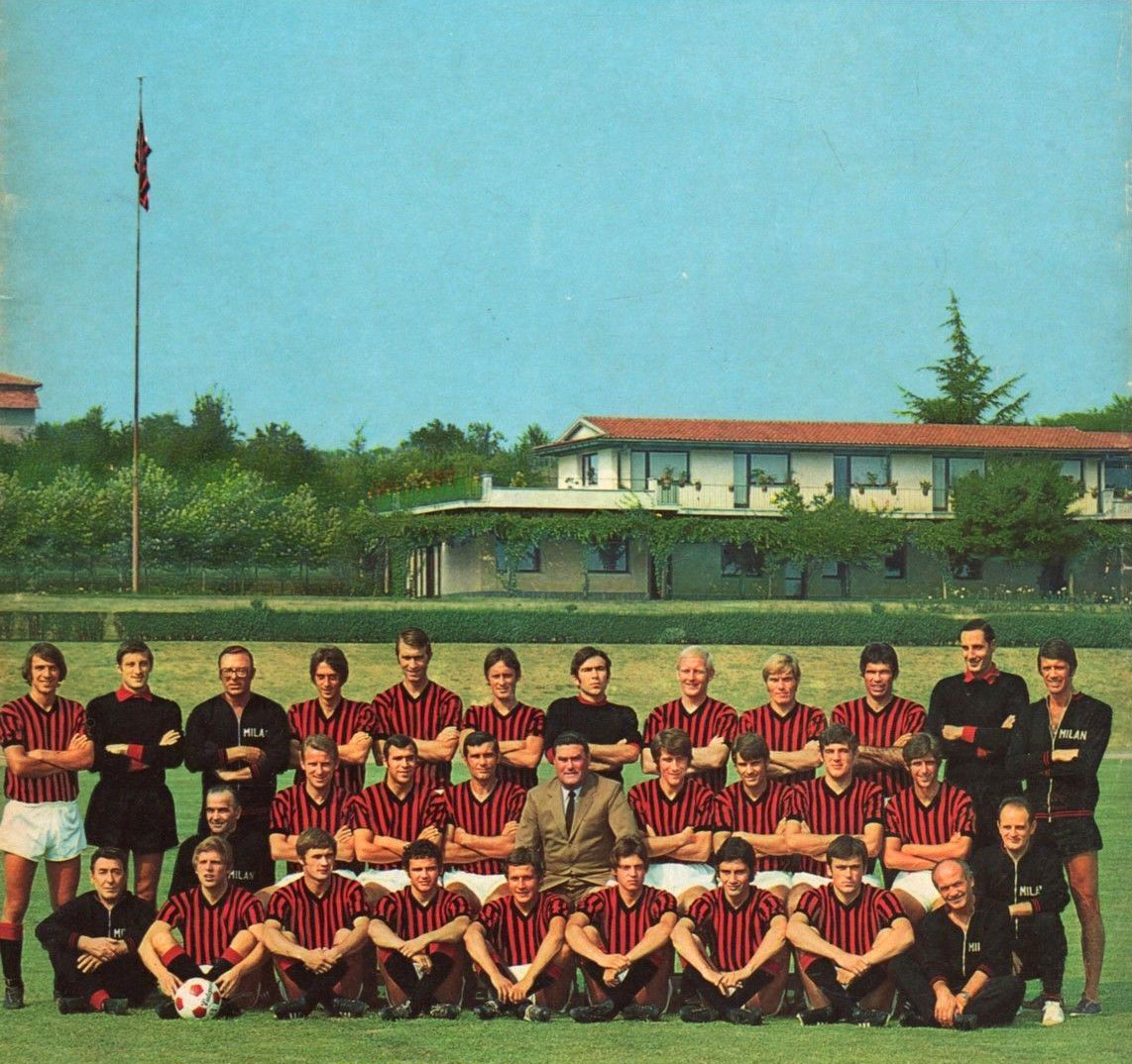 La rosa e lo staff tecnico del Milan per la stagione 1970-71 al centro sportivo di Milanello (Carnago).